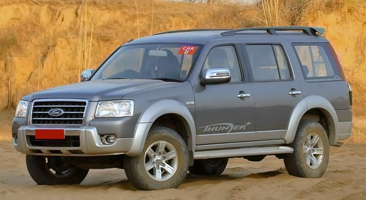 Ford Endeavour Thunder 4 X 4